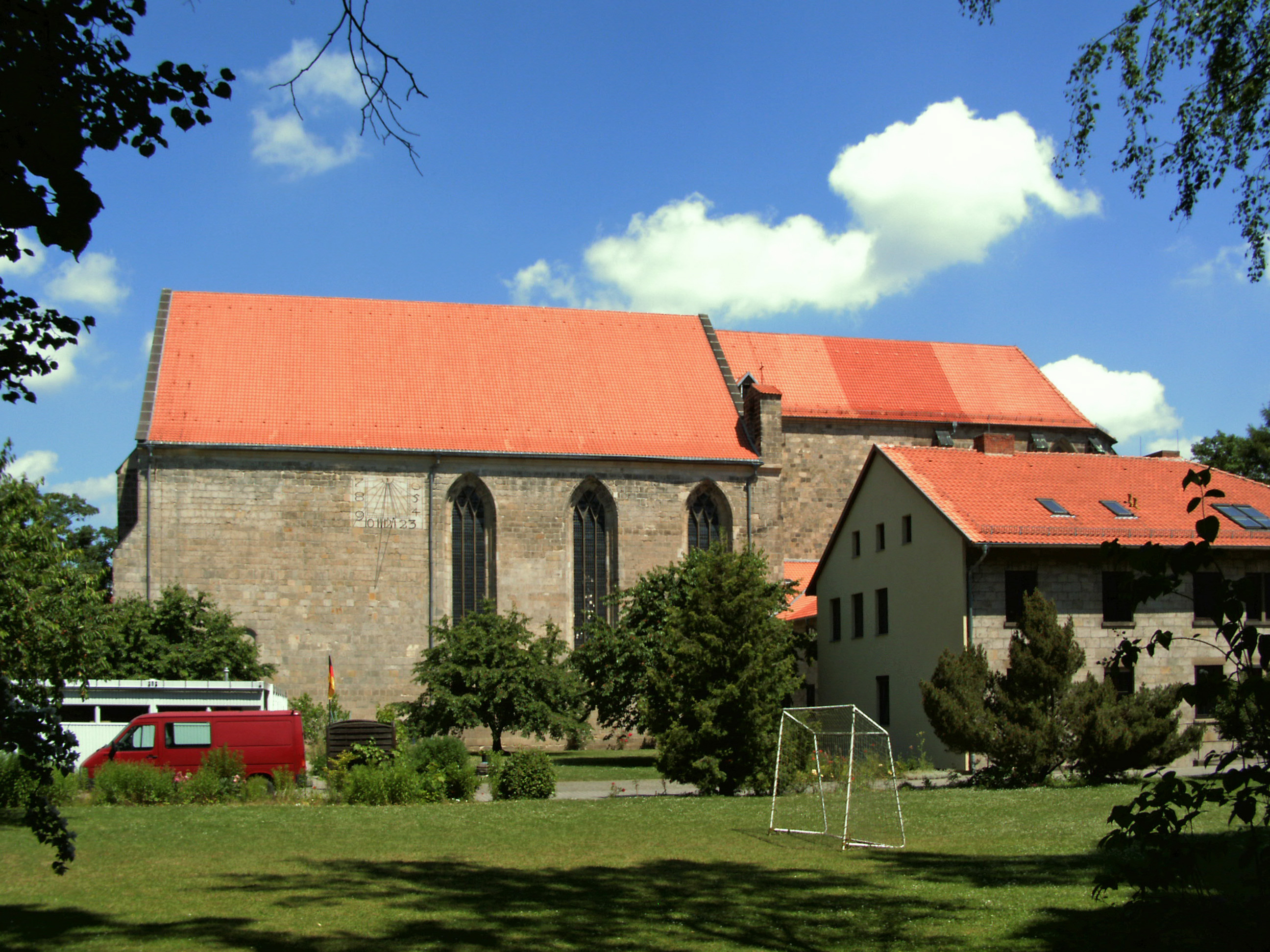 Katholische Kirche St. Andreas in Halberstadt, rechts im Bild das Franziskanerkloster, links im Bild die Wärmestube für Obdachlose